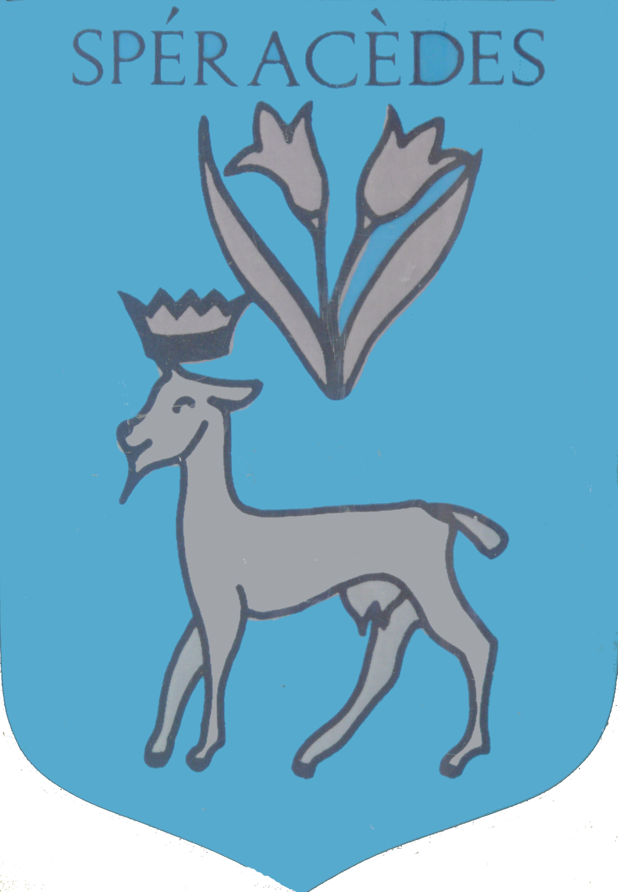 Spéracèdes - Blason